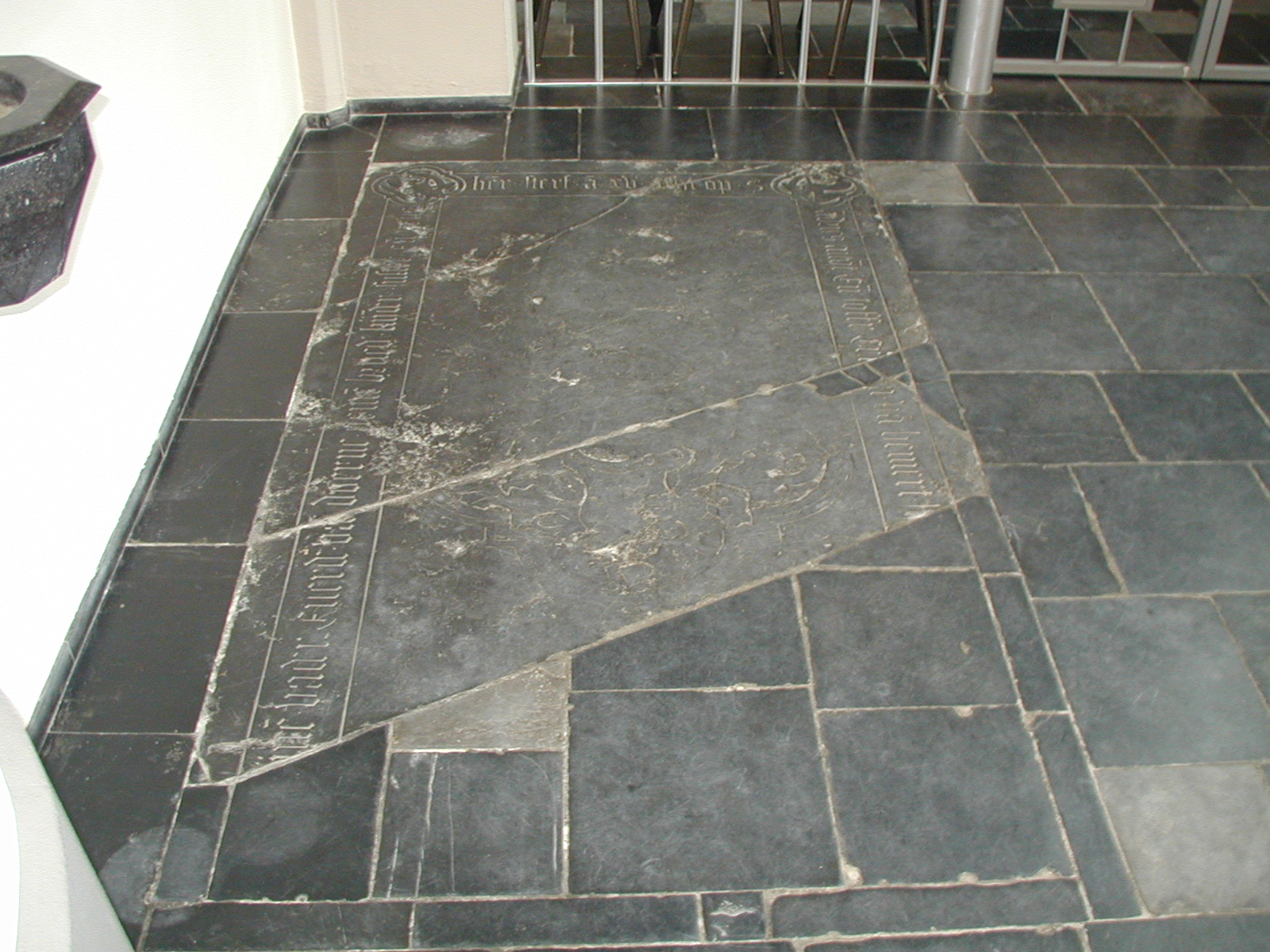 Grafsteen van Hendrick van Doerne, Christina van Hemert en hun familie uit de vroege zestiende eeuw in de St. Willibrorduskerk te Deurne. Foto zelf gemaakt op 25 januari 2004.